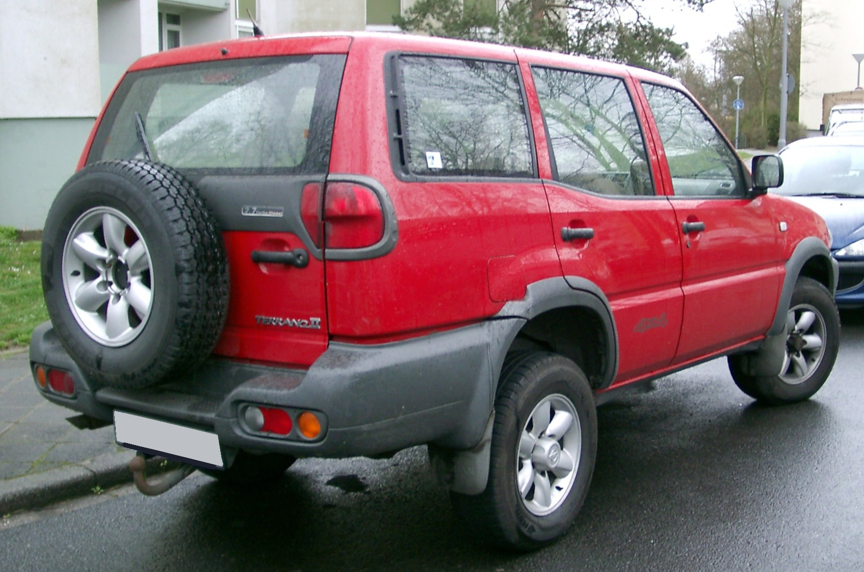 Nissan Terrano II